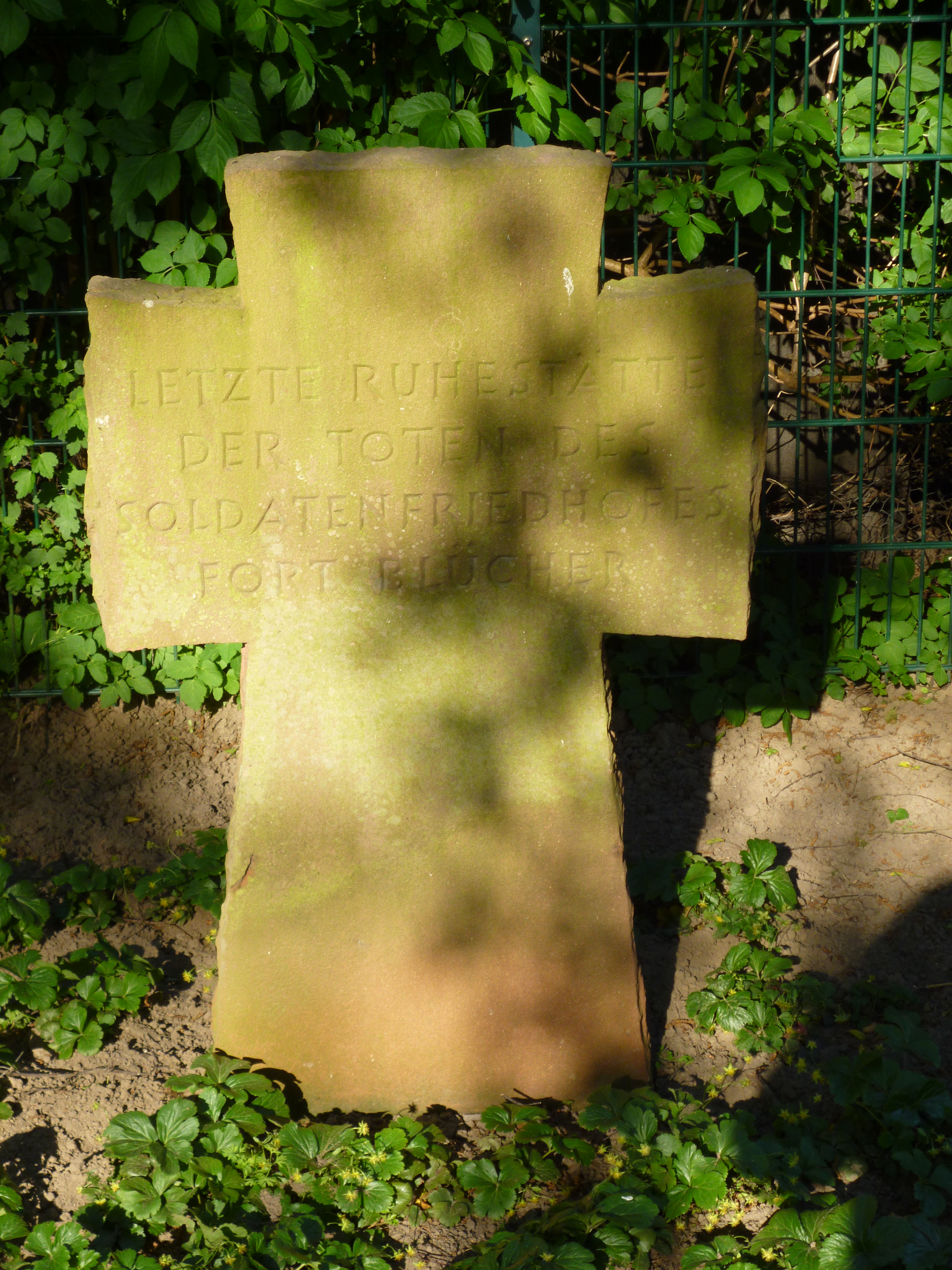 Letzte Ruhestätte der Soldaten des Soldatenfriedhofes Fort Blücher - am Rande des Büdericher Friedhofes